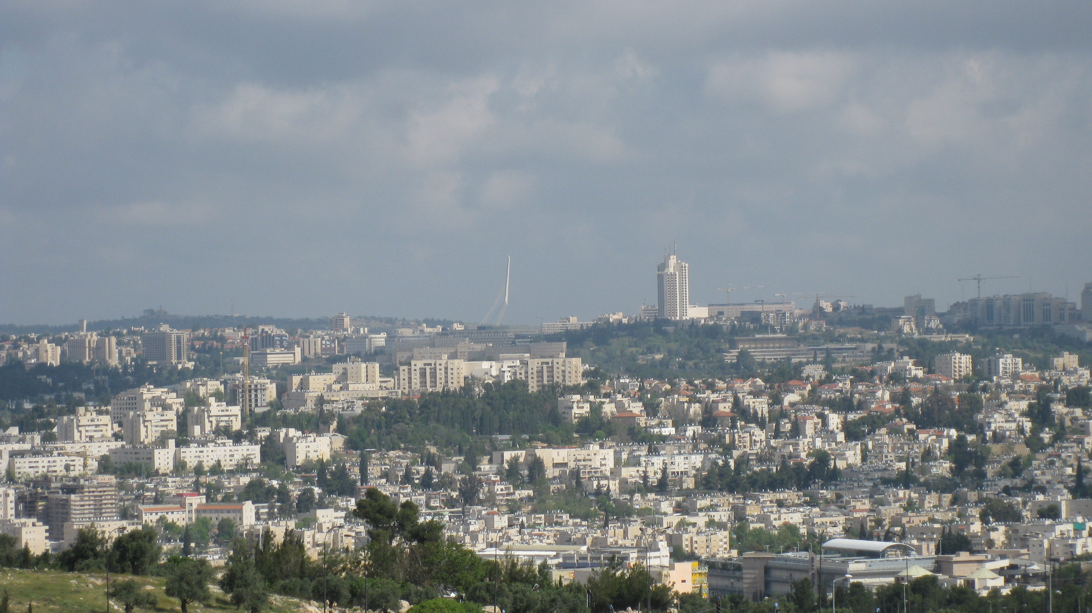 Views from Givat HaArbaa, near Hebron road, Jerusalem הנוף מגבעת הארבעה, מזרחית לדרך חברון ודרומית לרמת רחל, ירושלים